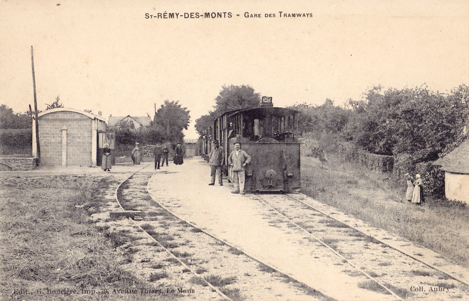 Carte postale ancienne éditée par G. Roncière au Mans, collection Aubry : SAINT-REMY-DES-MONTS - Gare des Tramways